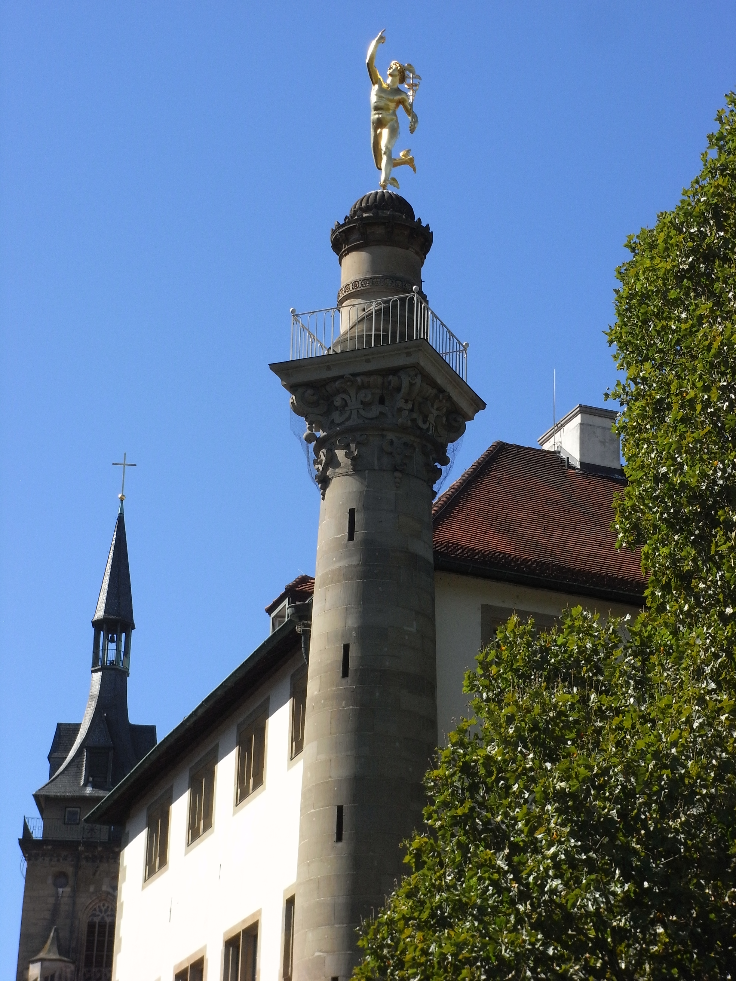 Stuttgart. Schillerplatz 5, Merkursäule (1598 von Wilhelm Pelargus) mit Jüngling aus Gold als Merkur (1862 von Ludwig Hofer).